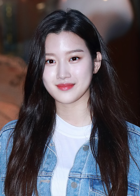 180501 문가영 위대한 유혹자 종방연